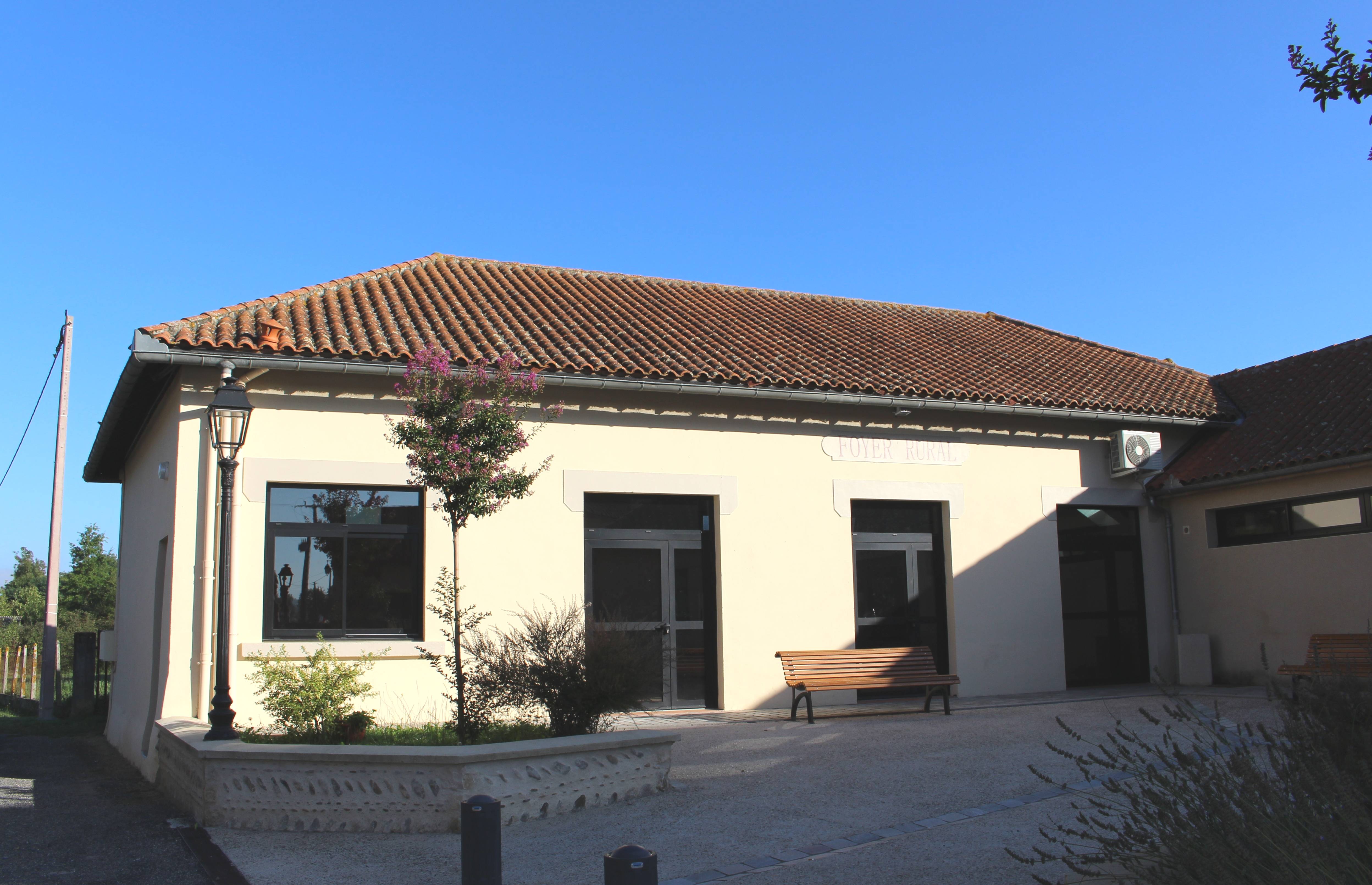 Foyer rural de Moulédous (Hautes-Pyrénées)